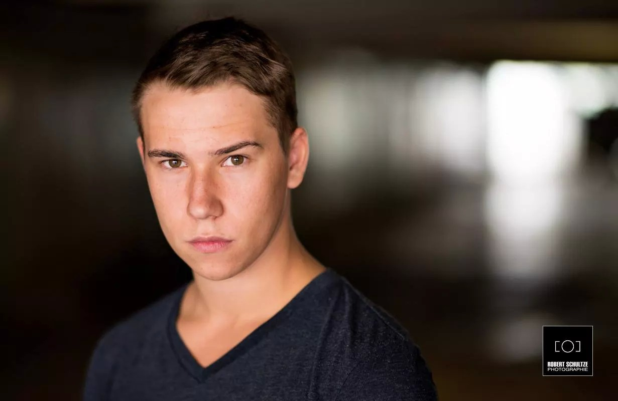 Actor